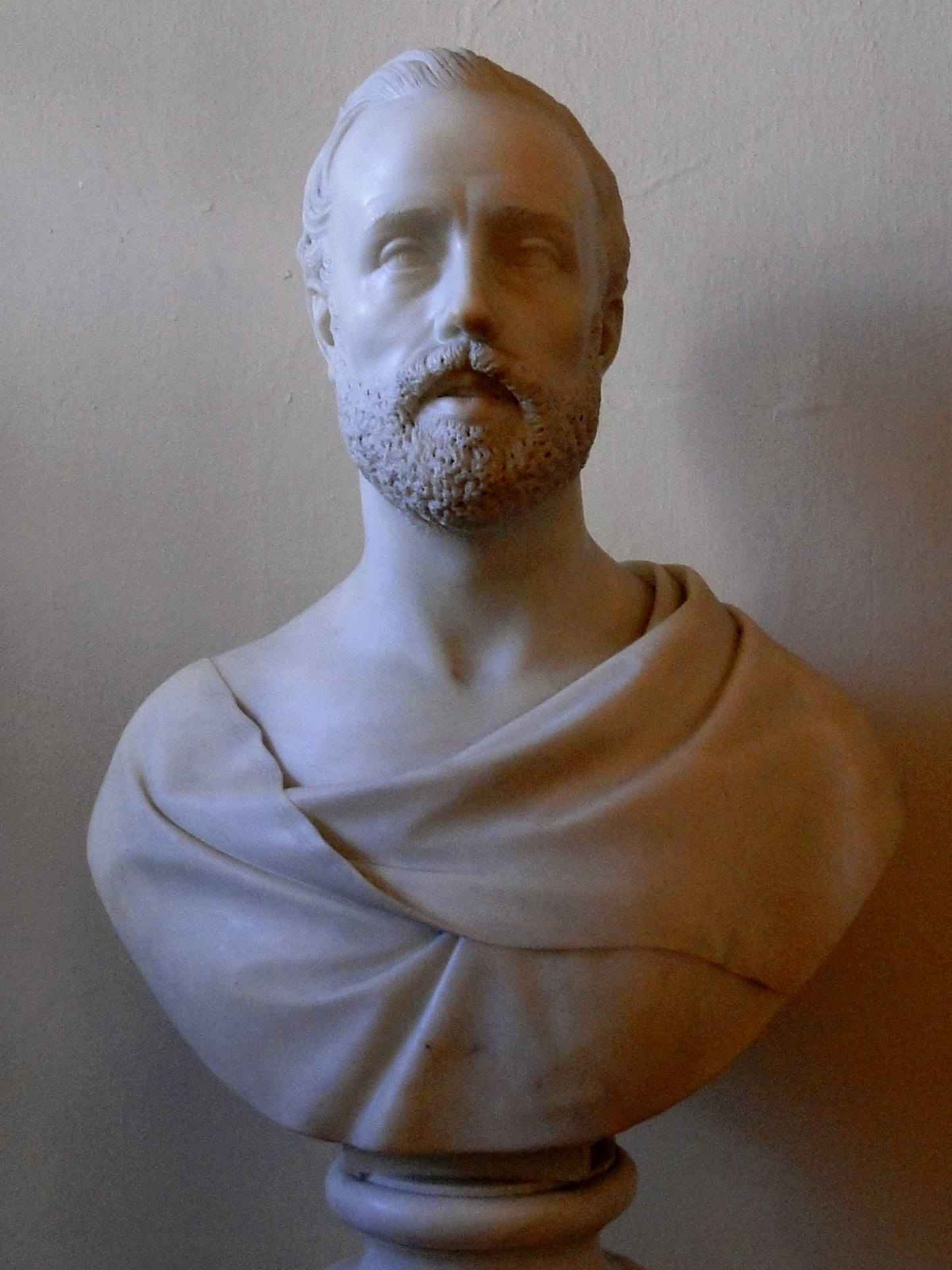 Gianmaria Benzoni, scultore italiano. Autoritratto presso Biblioteca Angelo Mai di Bergamo.